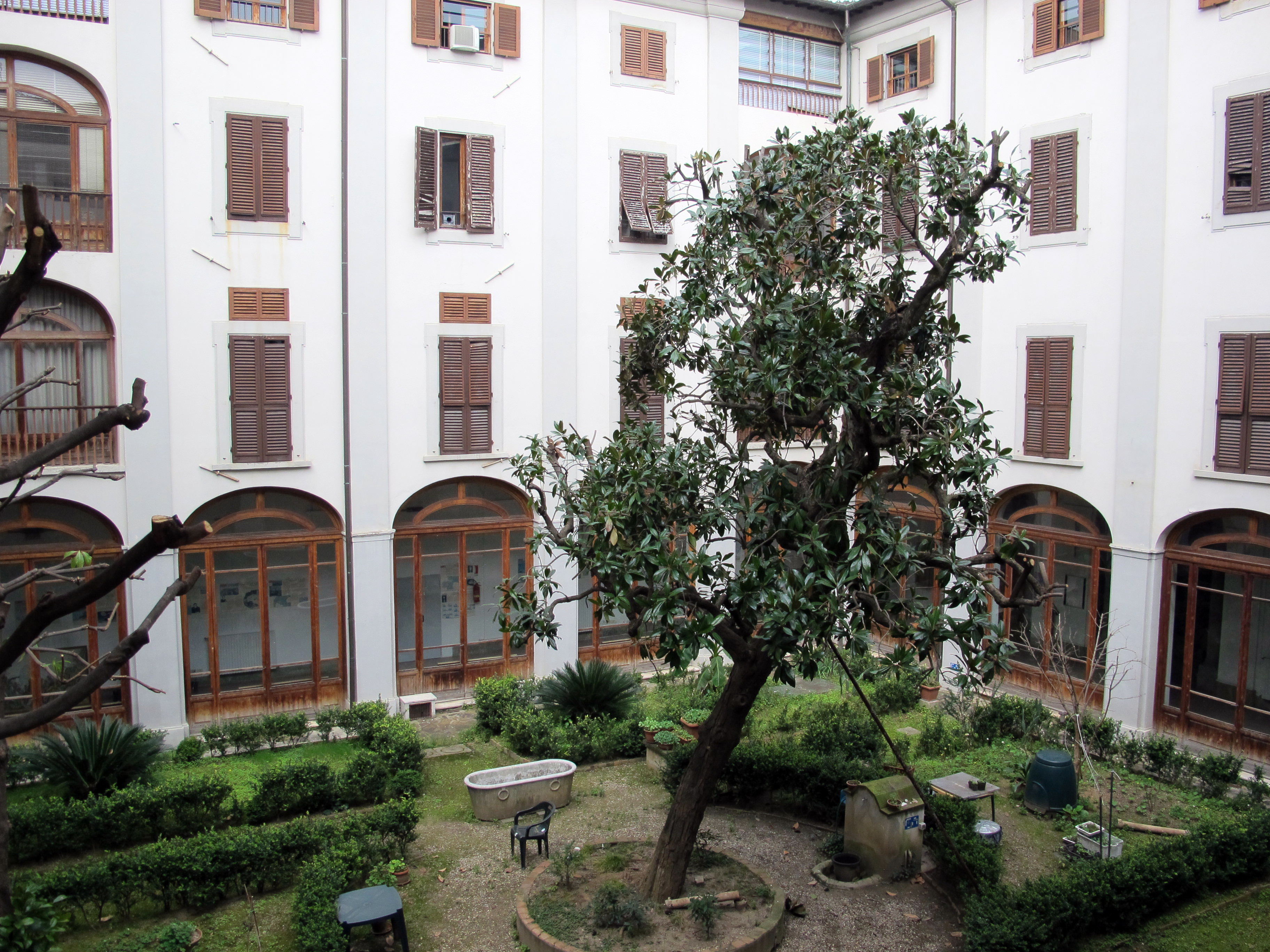 San Giovanni di Dio, Firenze